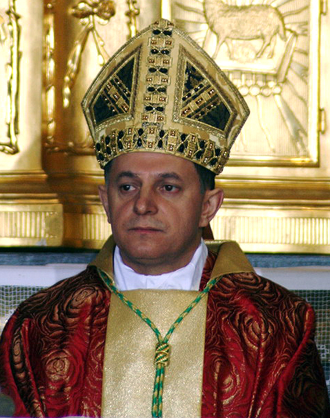 Arcybiskup Mieczysław Mokrzycki podczas ingresu w katedrze łacińskiej we Lwowie, 22 listopada 2008 r.